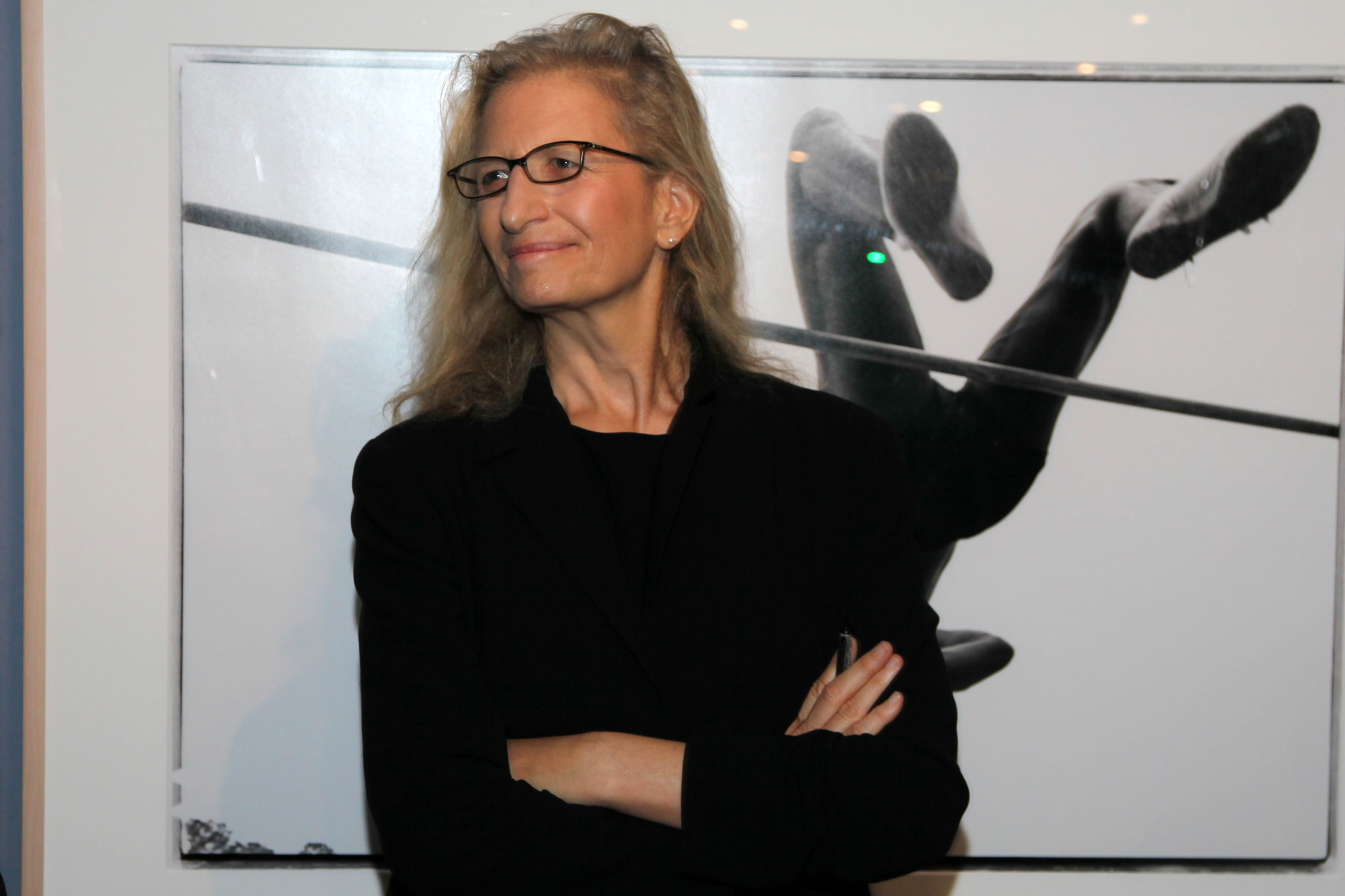 Leibovitz_Annie-091030-6843